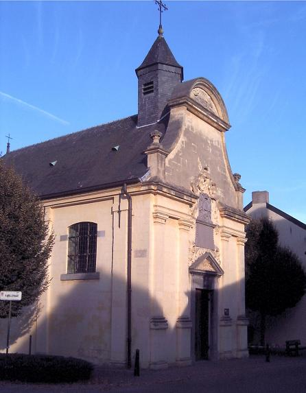 Limburgs: Heiliggraafkapel in Neerkan